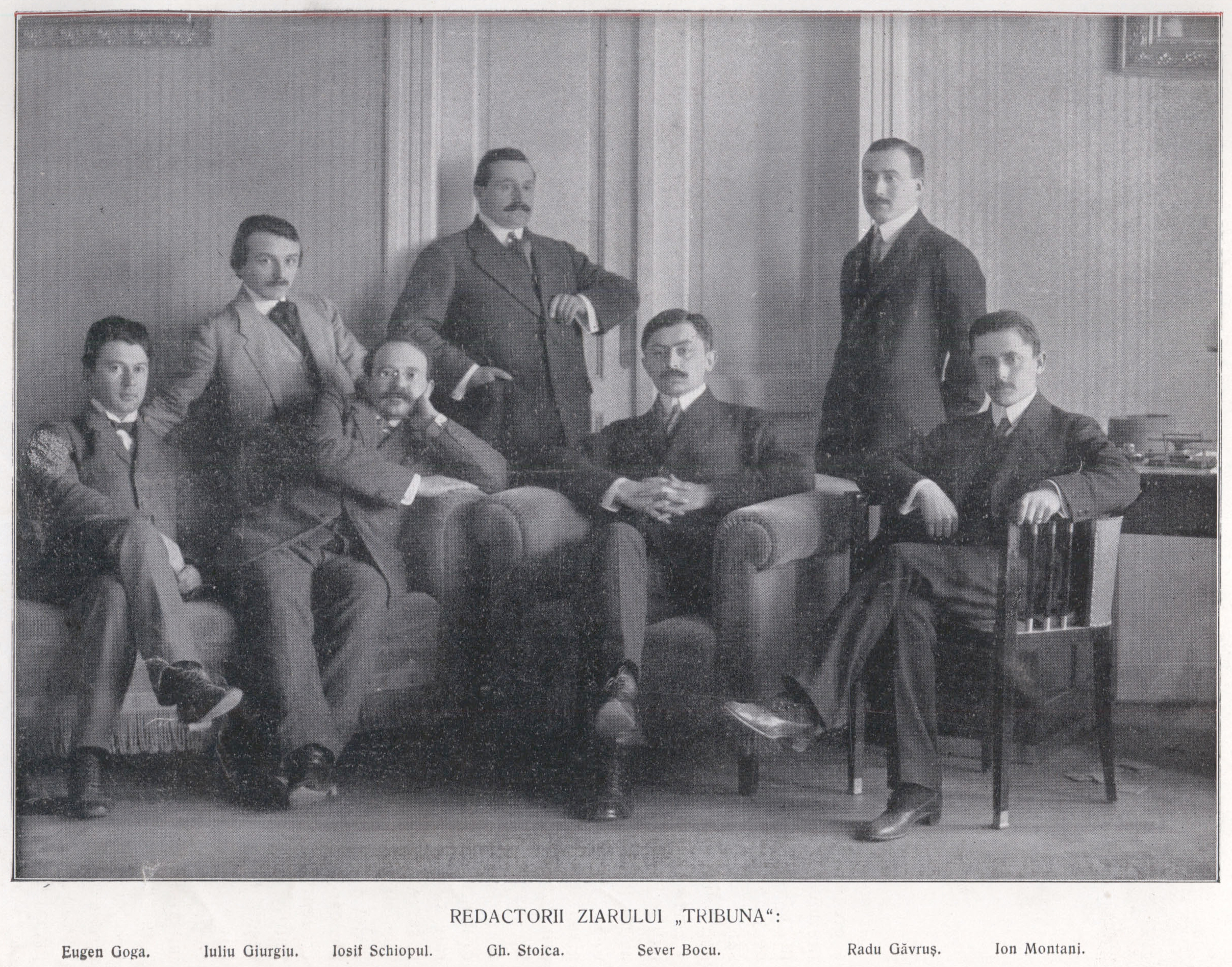 Redactorii ziarului Tribuna - imagine publicata in revista Luceafarul in iunie 1912